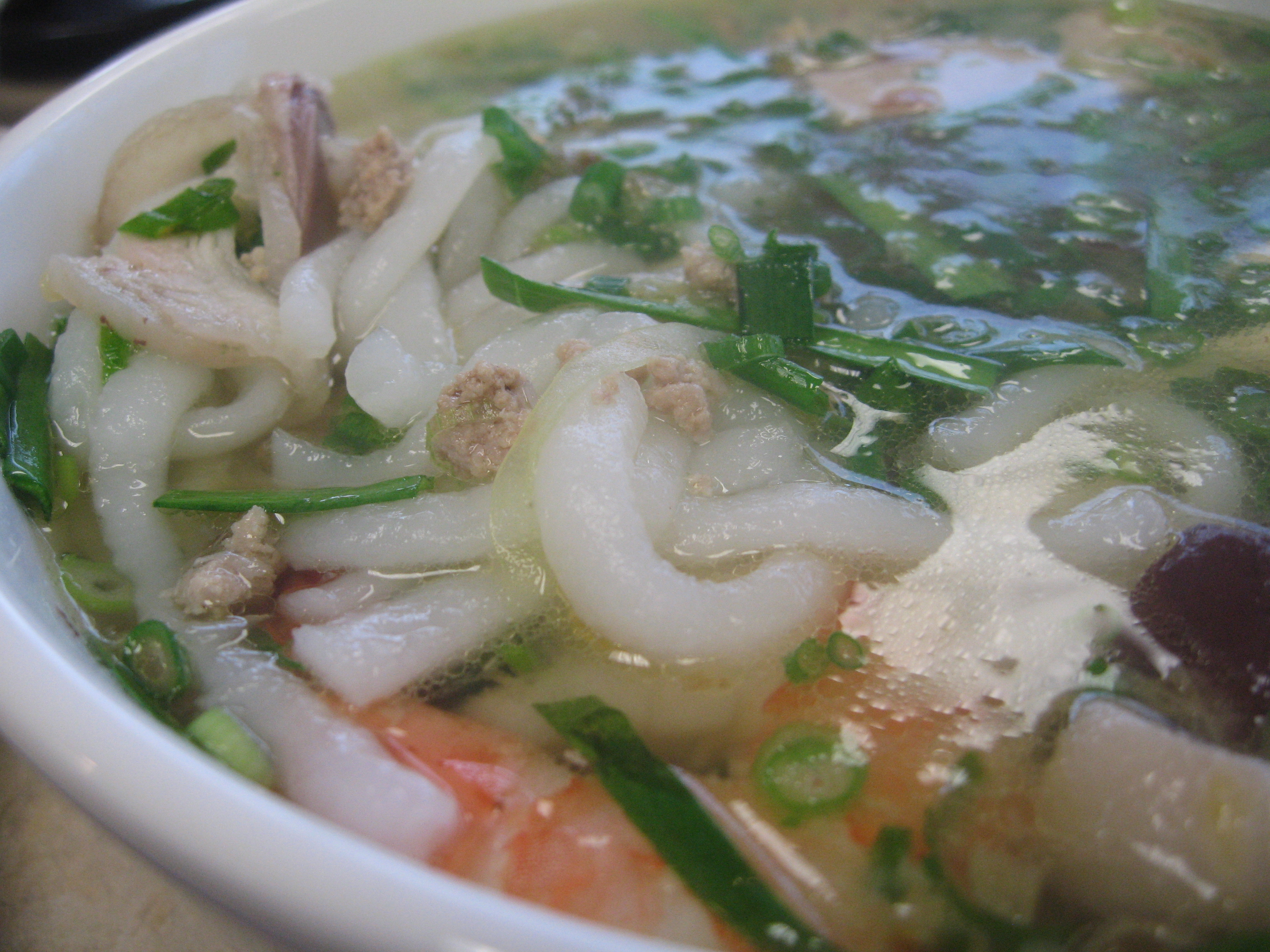 Bánh canh @ Ngoc Han Bun Bo Hue